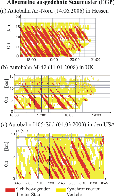 Verkehrsmuster EGP in der Anwendung ASDA/FOTO in drei Ländern (aus Artikel Rehborn/Palmer, siehe unten)